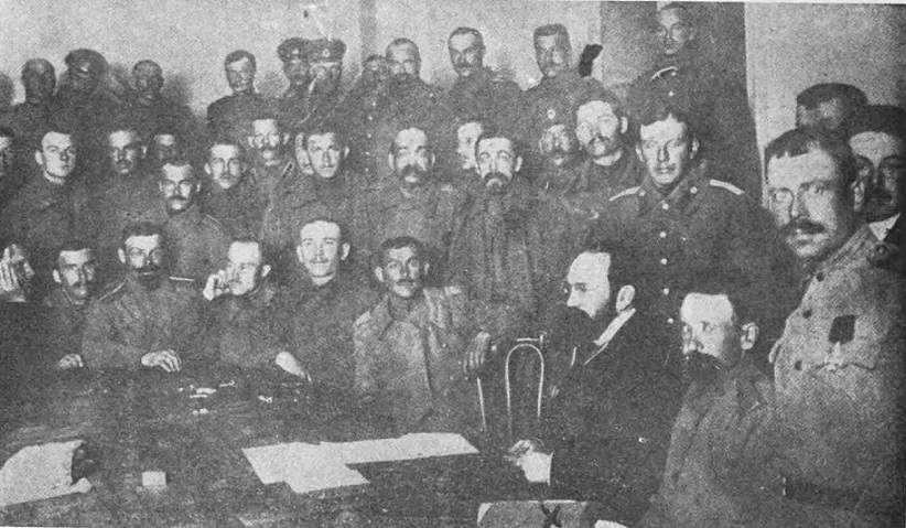 Nikolaj D. Sokolov (1870-1928) con i soldati del Soviet di Pietrogrado estensori dell'Ordine n. 1